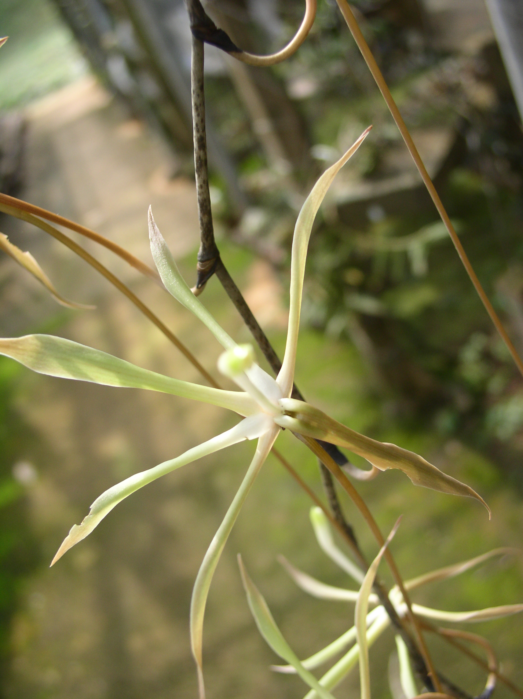 Inflorescence lâche en zigzag